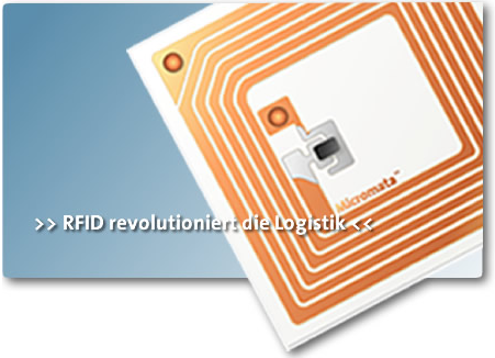 Imagen de un chip RFID